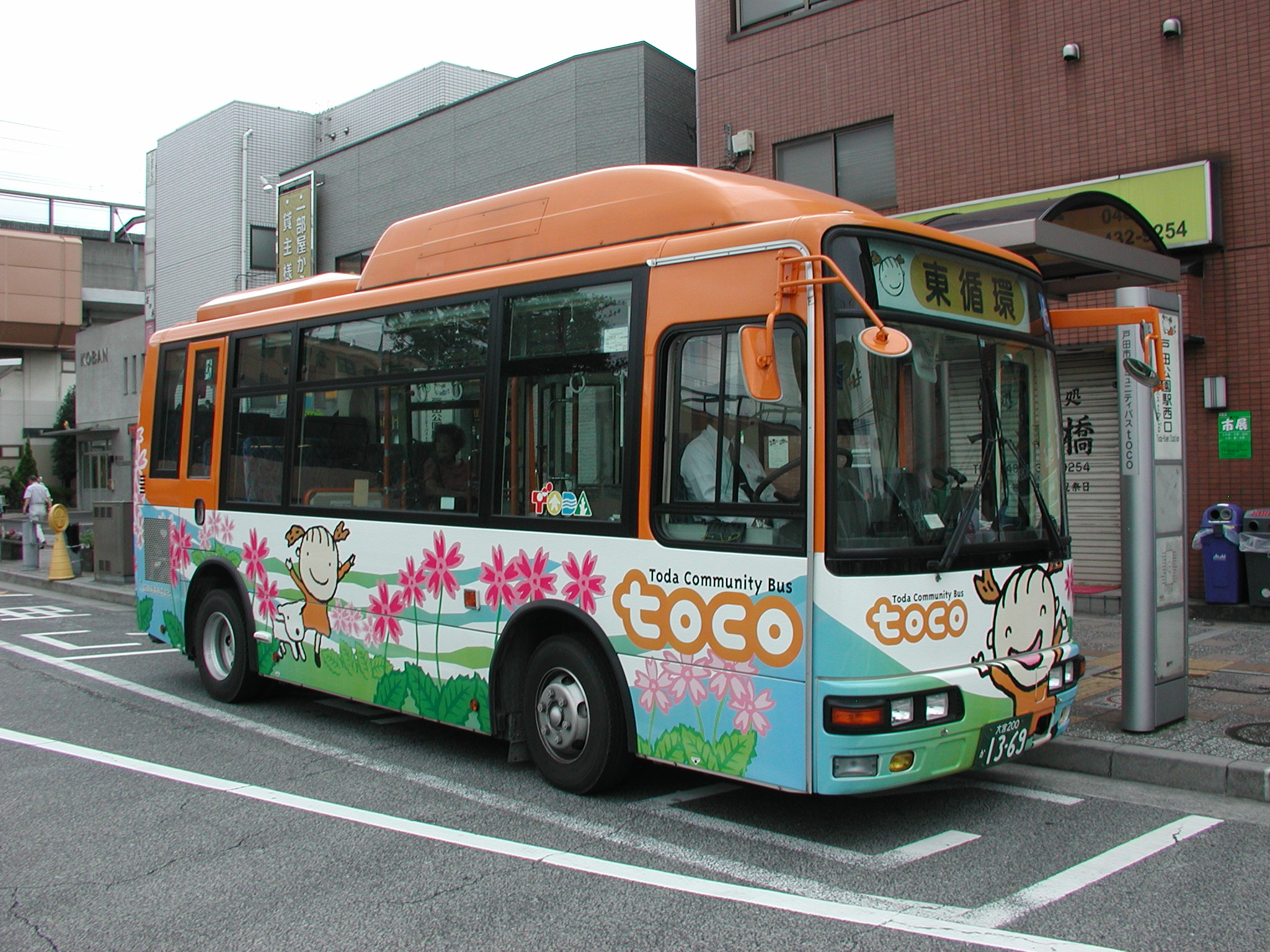 「戸田市コミュニティバス『toco』」東循環専用車両「サクラソウ」（三菱ふそう・エアロミディME：PA-ME17DF改/国際興業戸田営業所所属：社番・738） 戸田公園駅西口にて